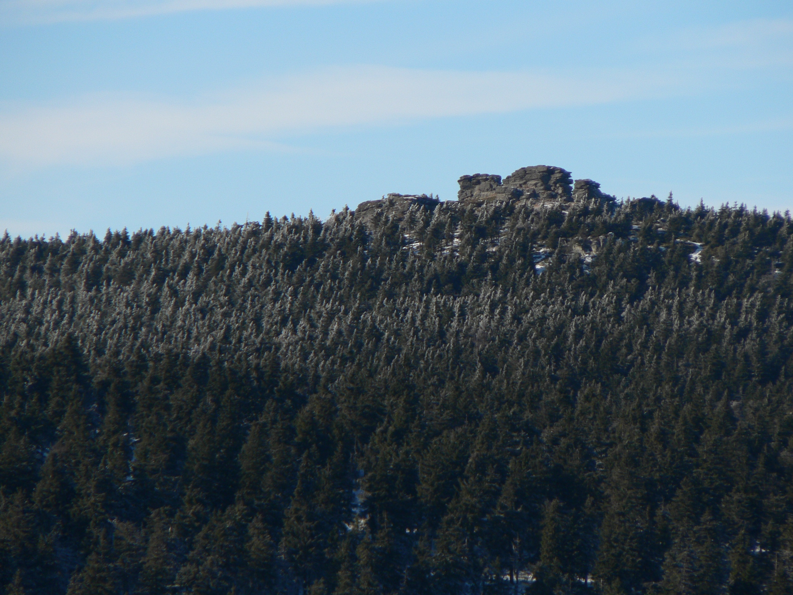 Pohled na vrchol Vozky z Červené hory.